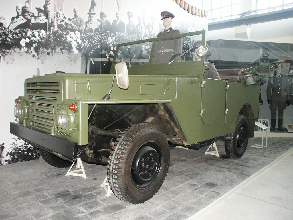 Horch P2M (oder P2) Geländewagen der NVA (IFA-Produktion), im Bundeswehrmuseum Dresden.